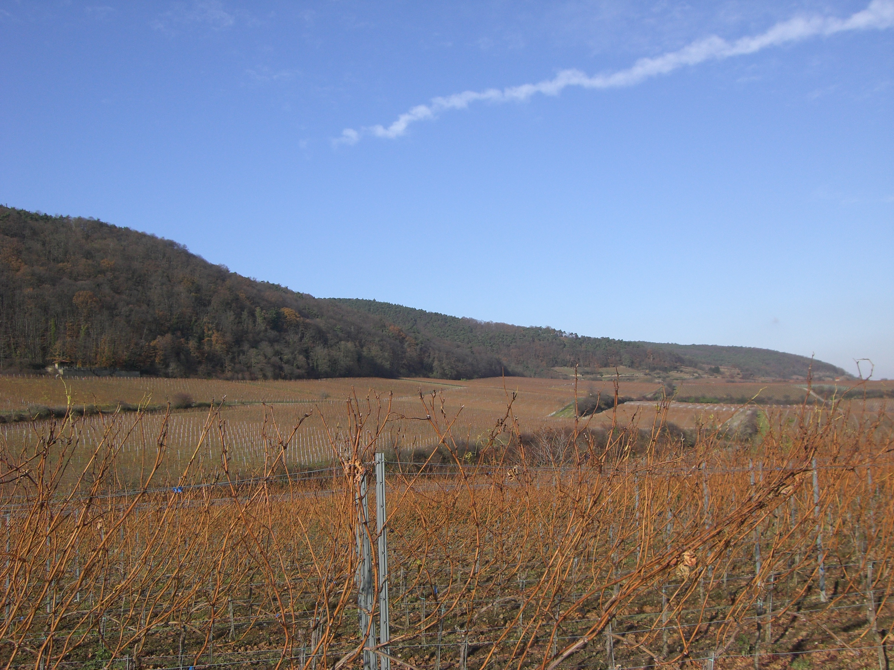 Haardtrand bei Deidesheim